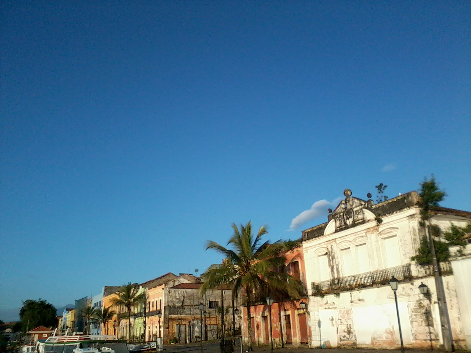 Bela foto mostra o lindo céu azul sobre os casarios históricos na rua General Carneiro na cidade de Paranaguá